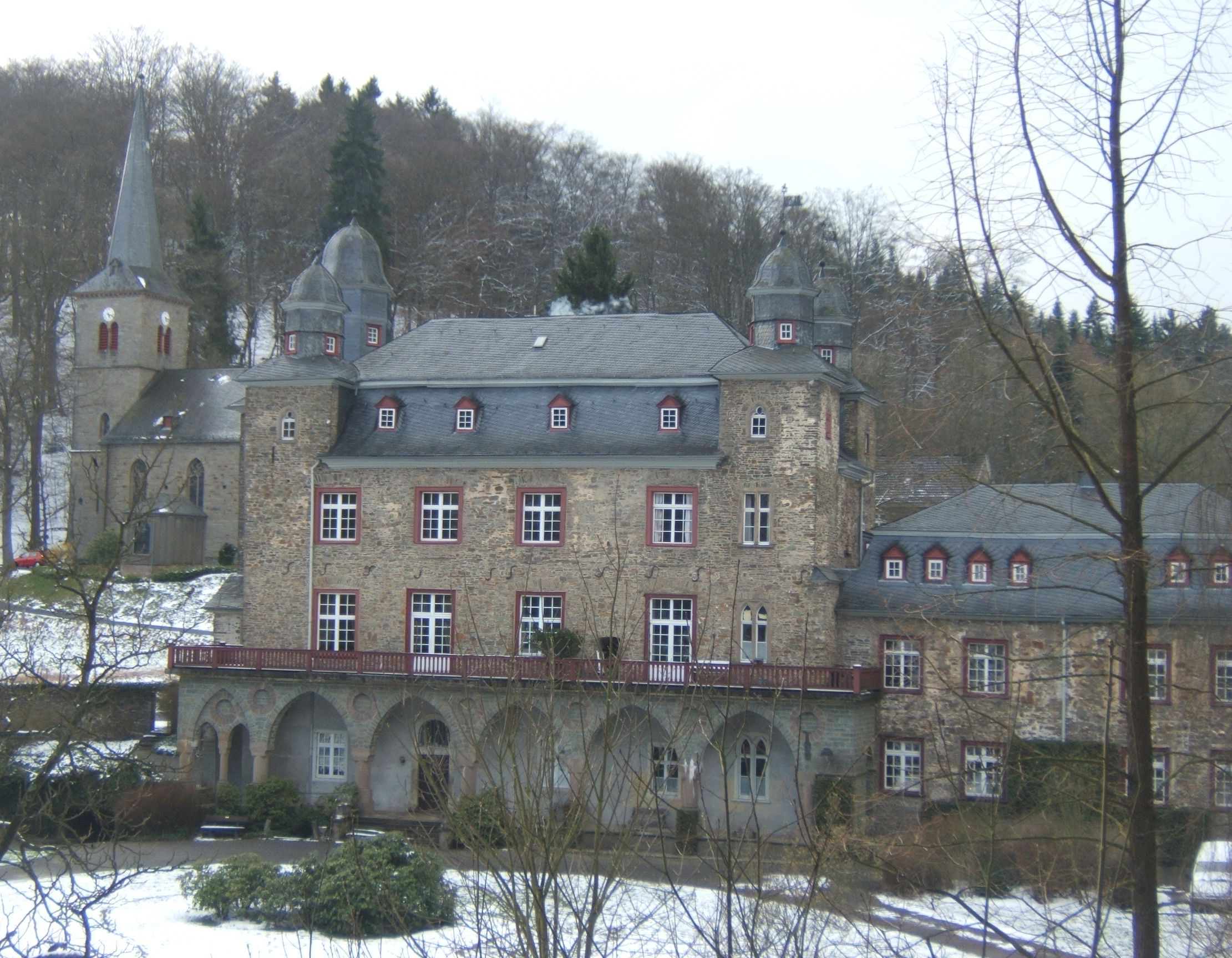 Schloss und Schlosskirche in Gimborn (Gemeinde Marienheide)